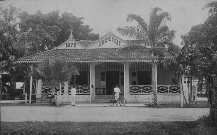 Foto. De sociëteit in Palembang